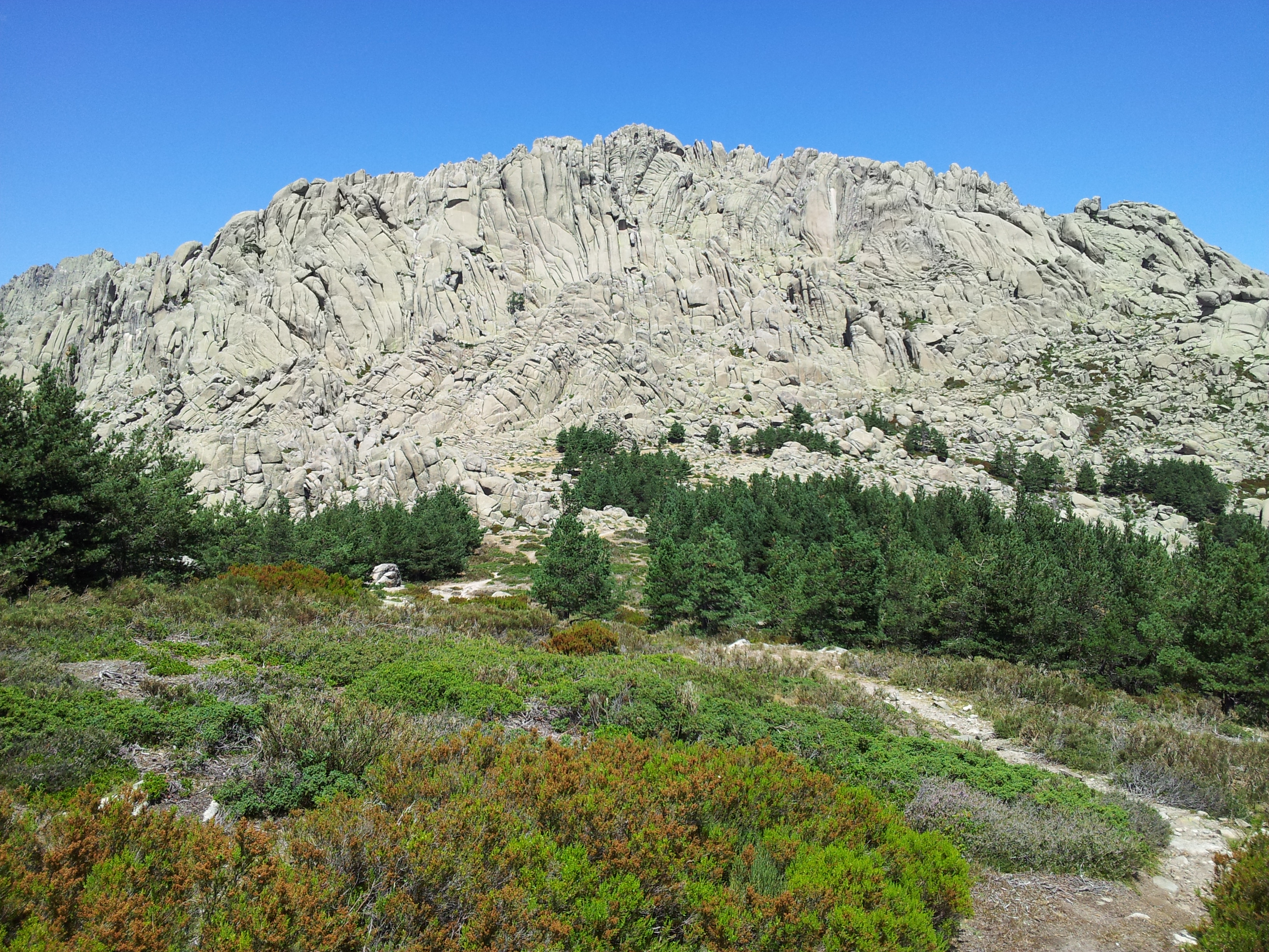 Cerro de los Hoyos visto desde el collado de la Ventana